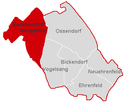 Lagekarte Bocklemünd/Mengenich im Stadtbezirk Köln-Ehrenfeld